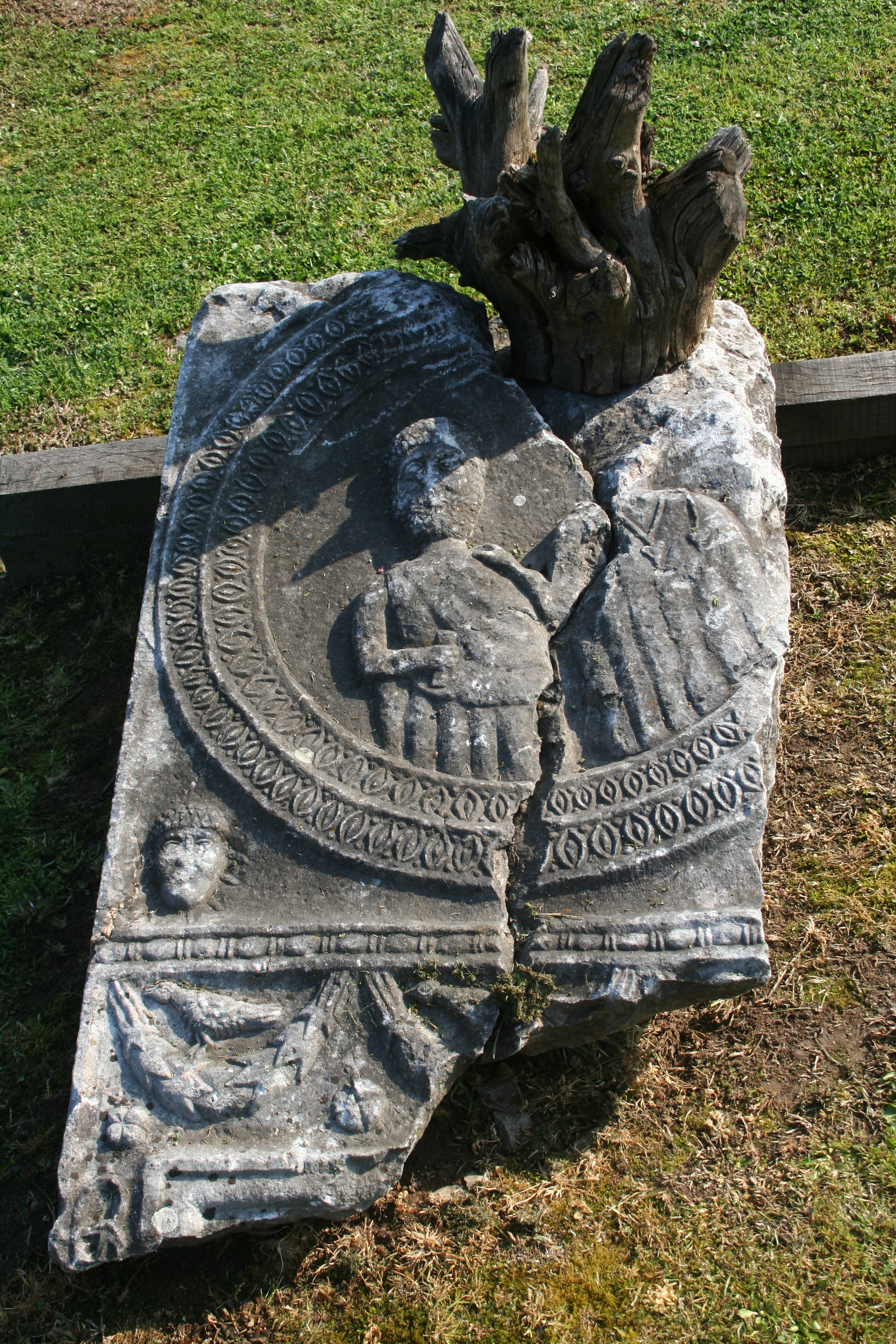 Etno selo Vrhpolje